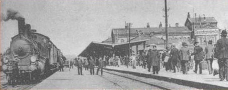 Bahnsteige des alten Geestemünder Bahnhofs